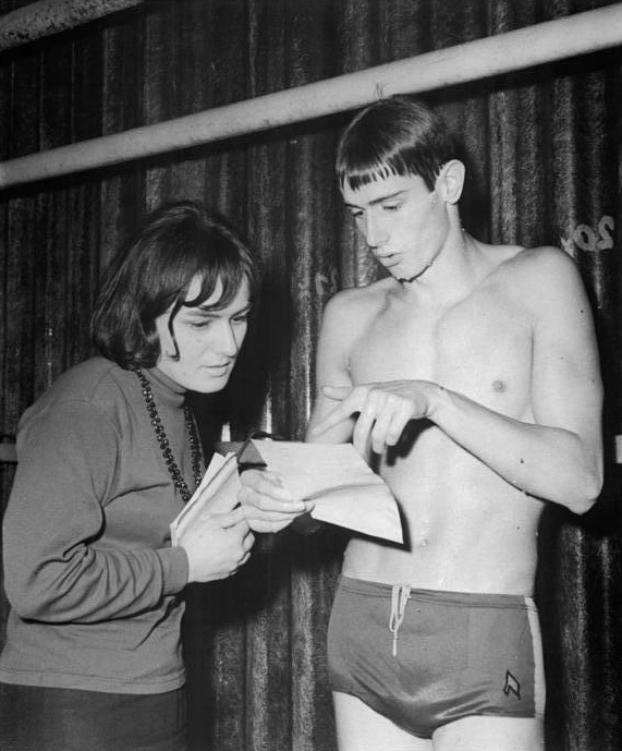 Roland Matthes Zentralbild Gahlbeck 13.11.1967 Leipzig: Roland Matthes schwamm Weltrekord über 200 m Rücken Roland Matthes (SC Turbine Erfurt) stellte am 8.11.1967 in Leipzig mit 2:07,9 min über 200 m Brücken einen neuen Weltrekord auf. Erstes Interview nach dem Erfolg mit der Berichterstatterin der "Jungen Welt", Heidi Fischer.